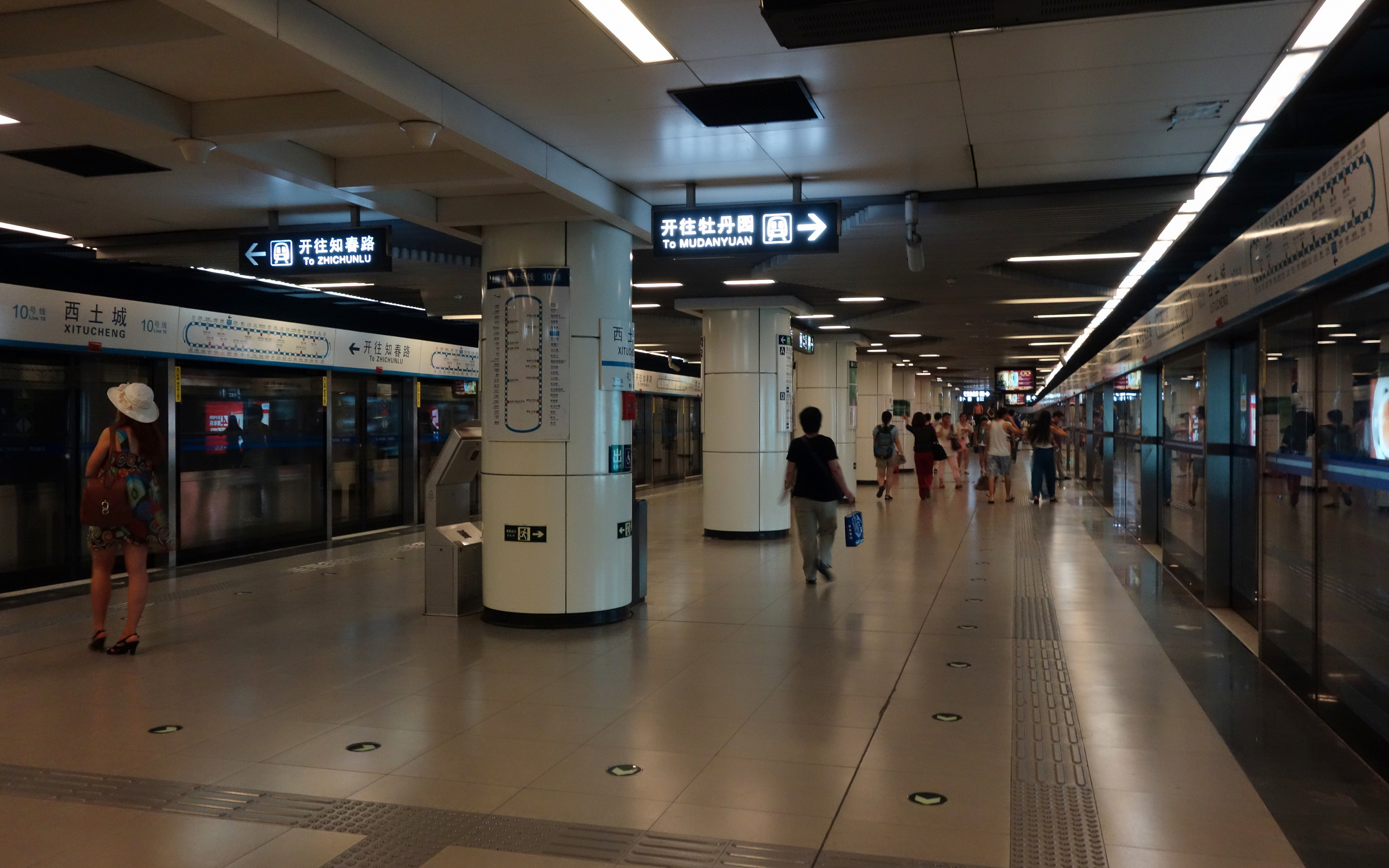 北京地铁10号线西土城站站台